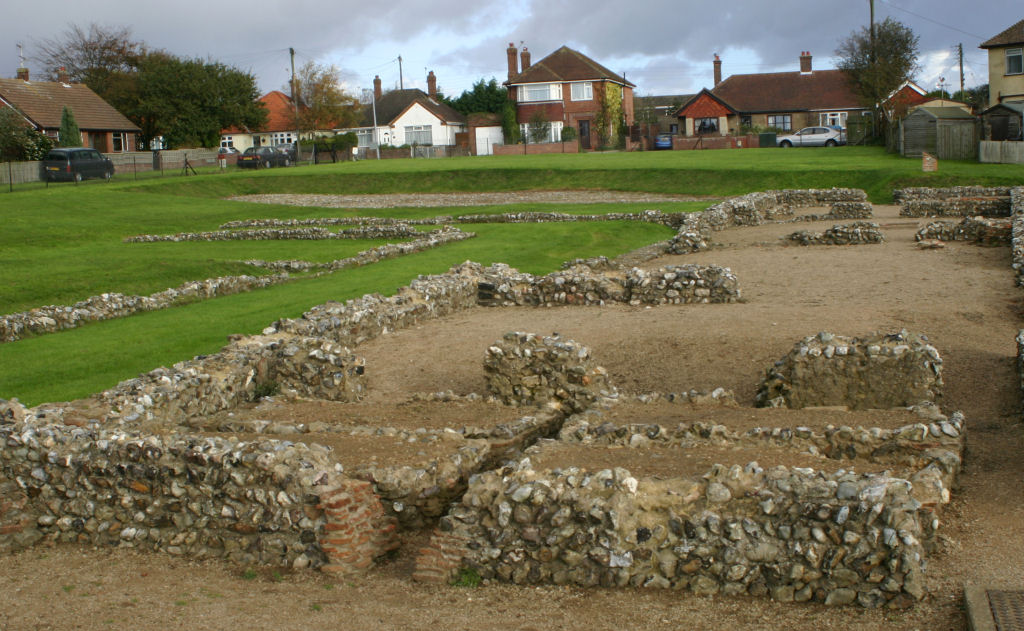 Caister Roman Site.